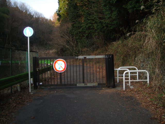 アップロード者が2009/12/24に撮影。